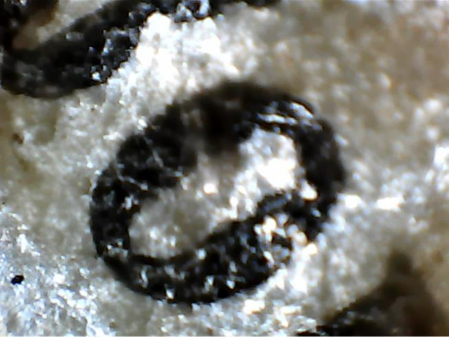 Imagen de una letra “O” escrita con tinta sobre papel vista con un microscopio.